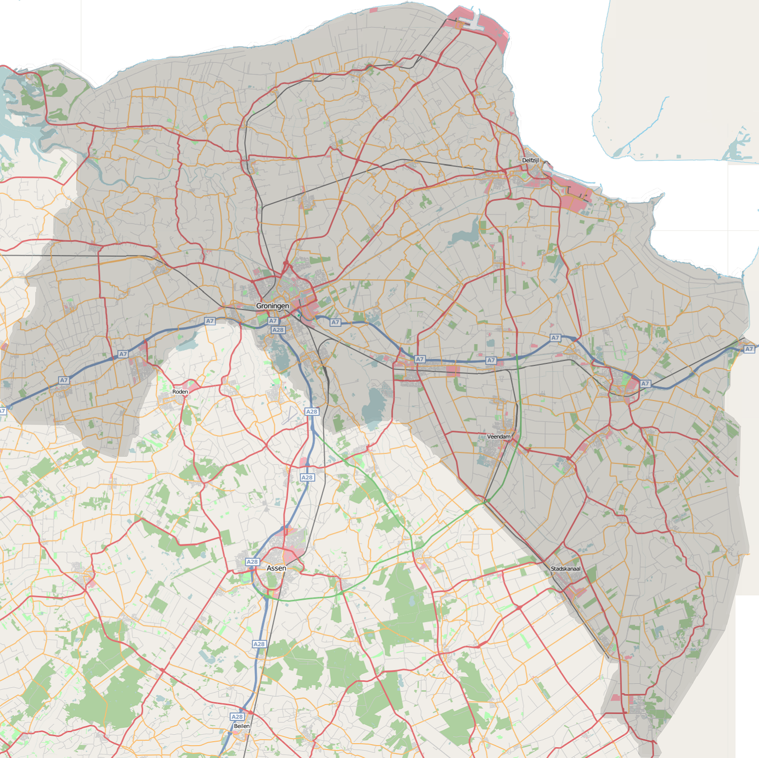 "Groningen"